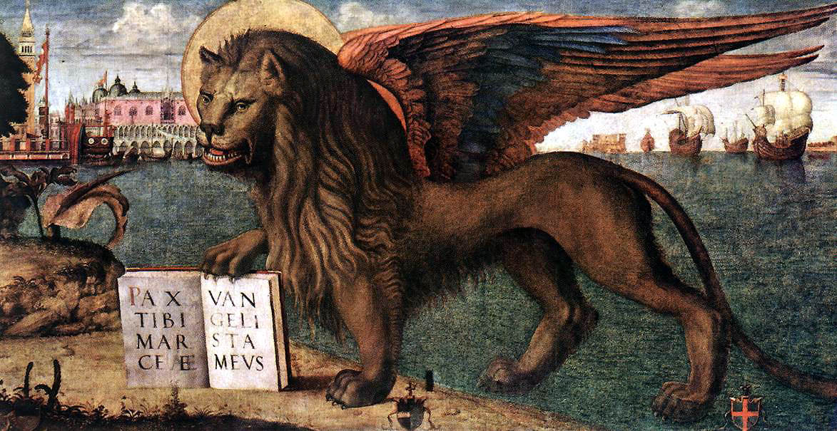 Detail